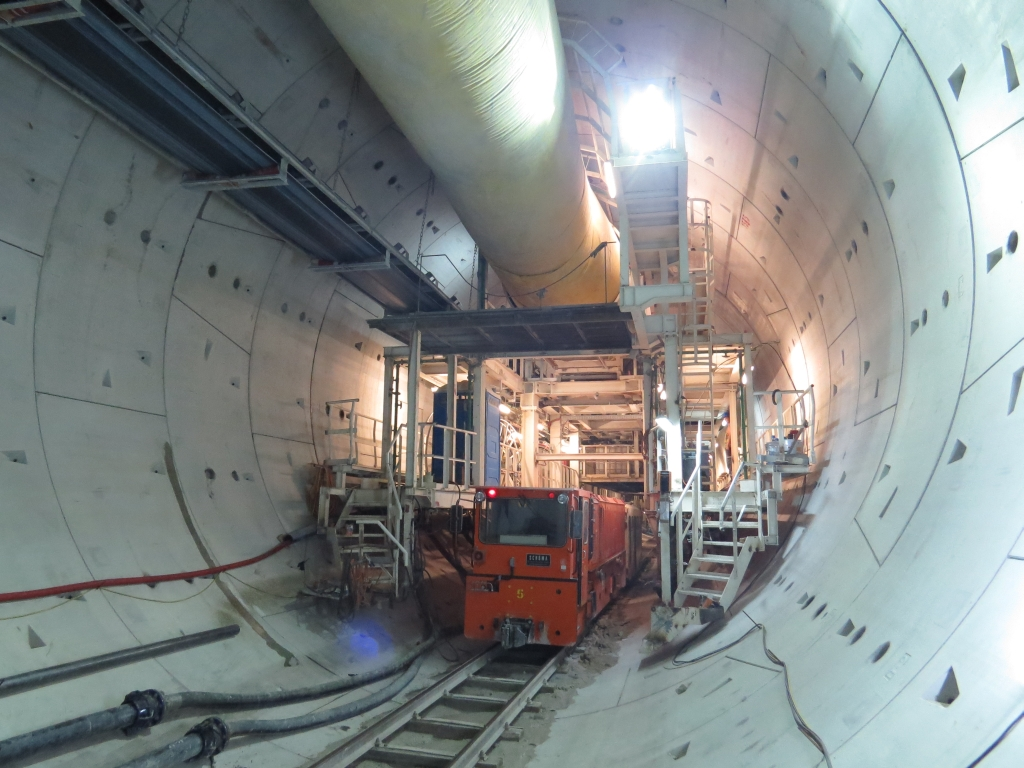 מכונת הכרייה במנהרה מספר 1